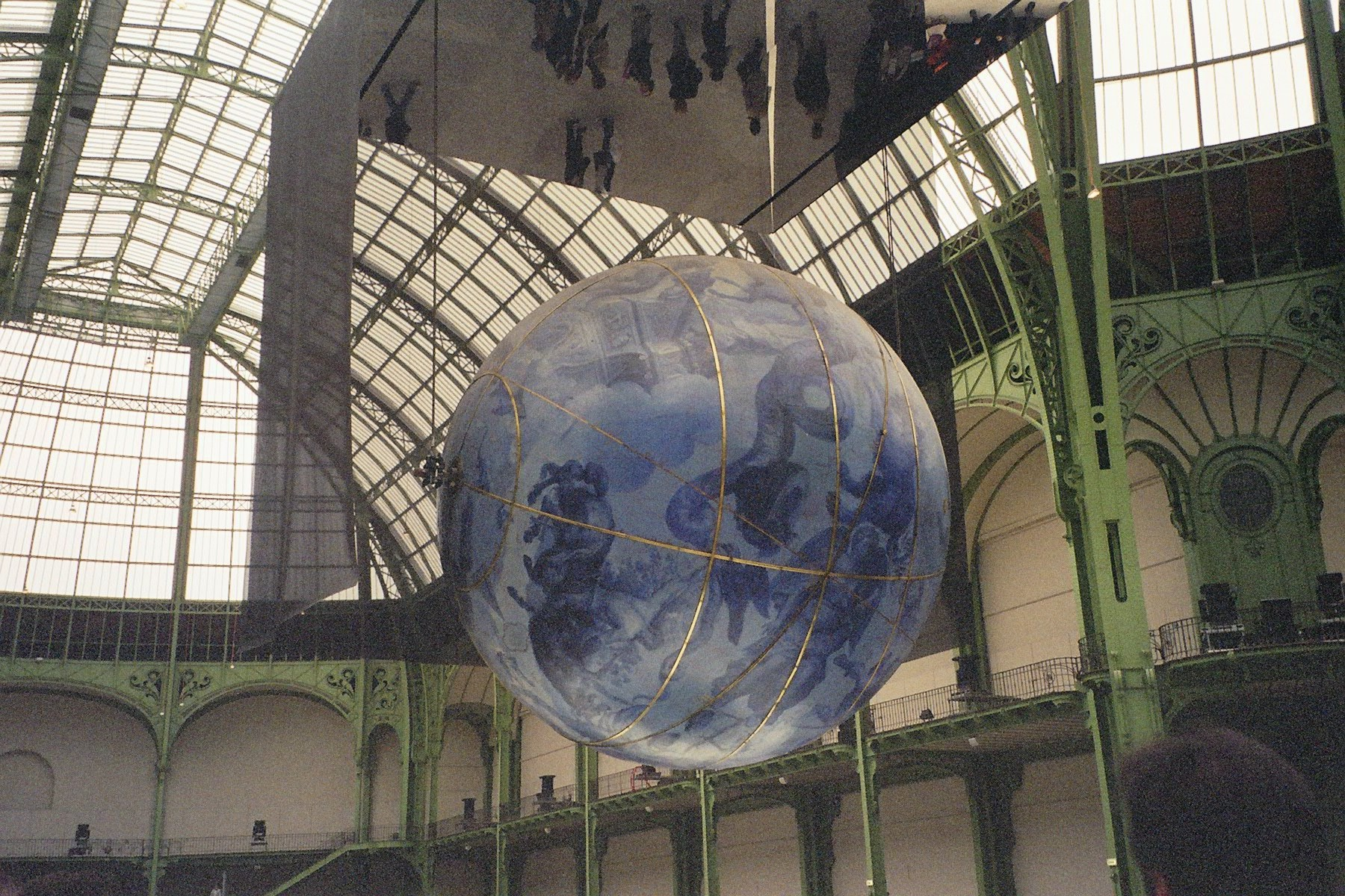 Grand Palais, Paris, France